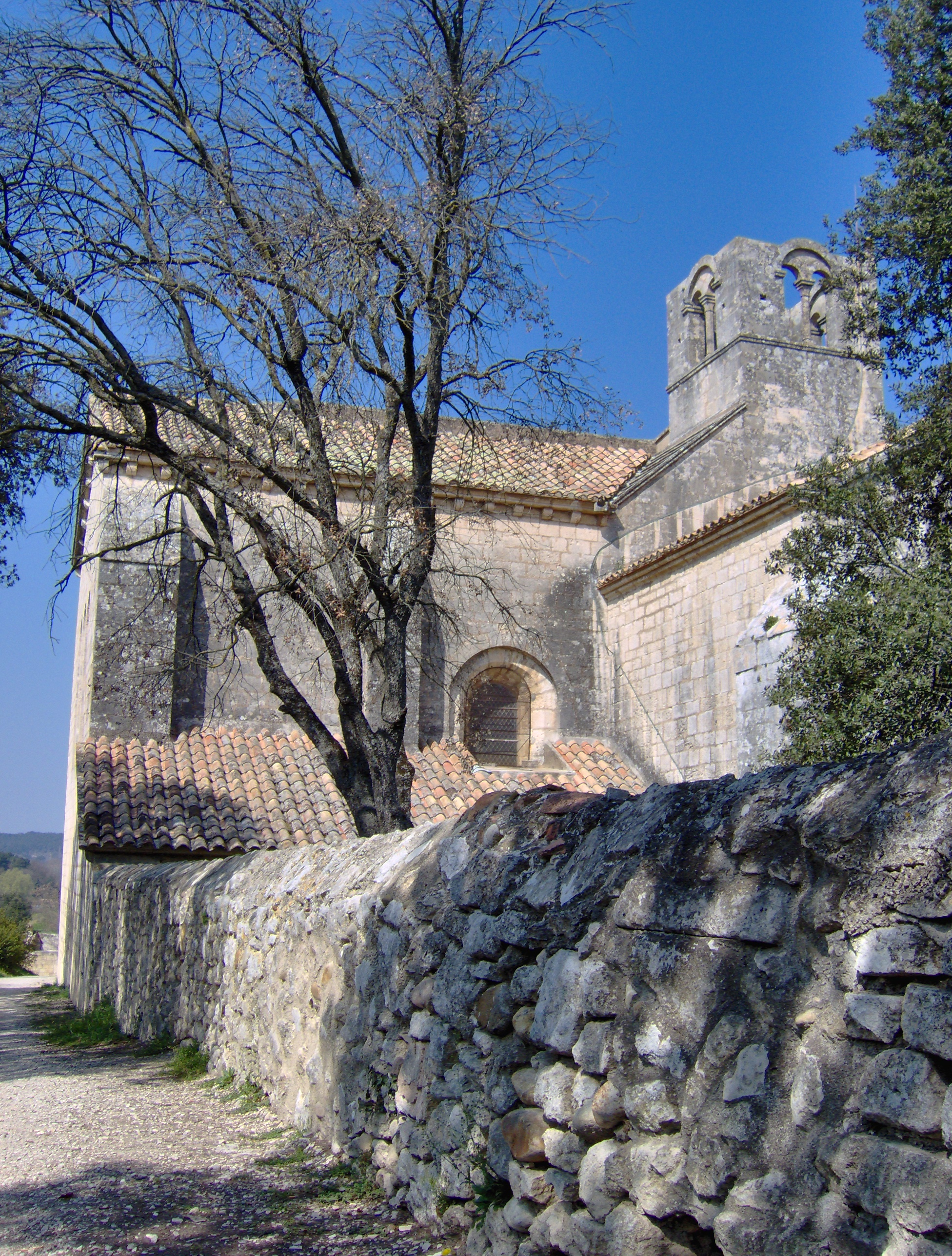 Chevet de l'abbatiale cistercienne de Silvacane.